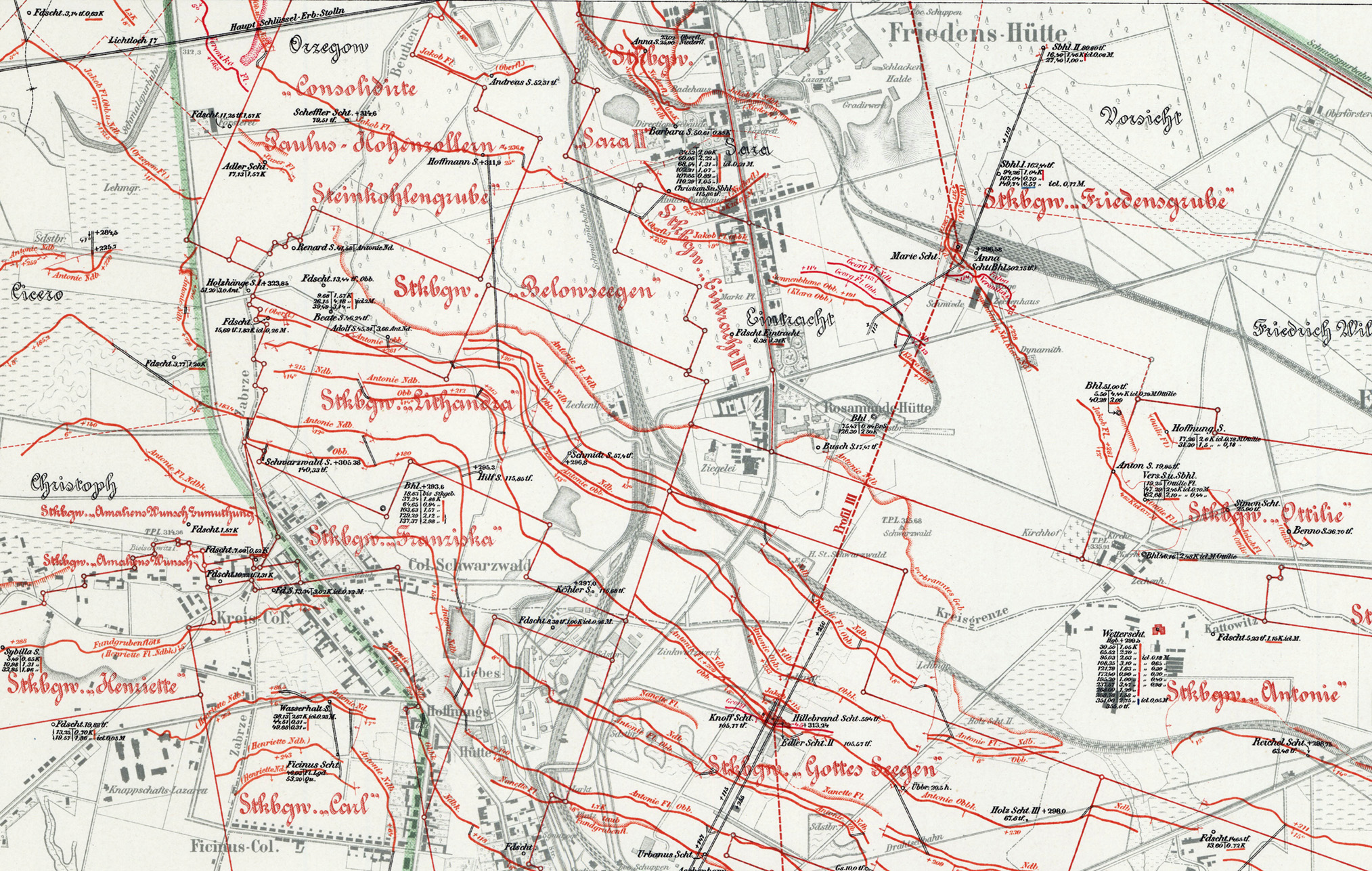 Ausschnitt aus der Flötzkarte (sic!) "Nr. 24 Antonienhütte" des Oberbergamtes Breslau von 1901. Erstveröffentlichung in der Buchhandlung Priebatsch, Breslau.